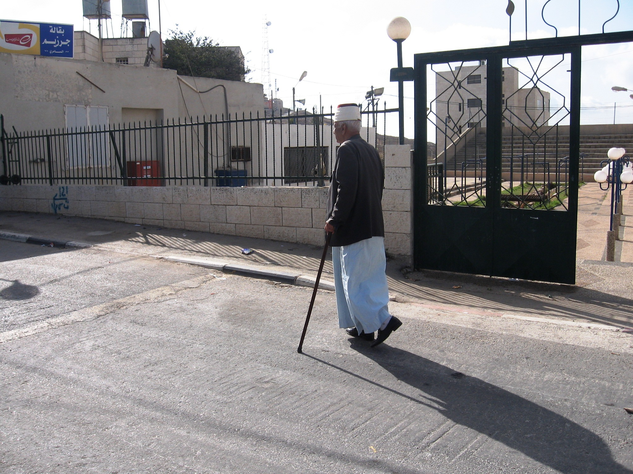 תרבות השומרונים בהר זריזים